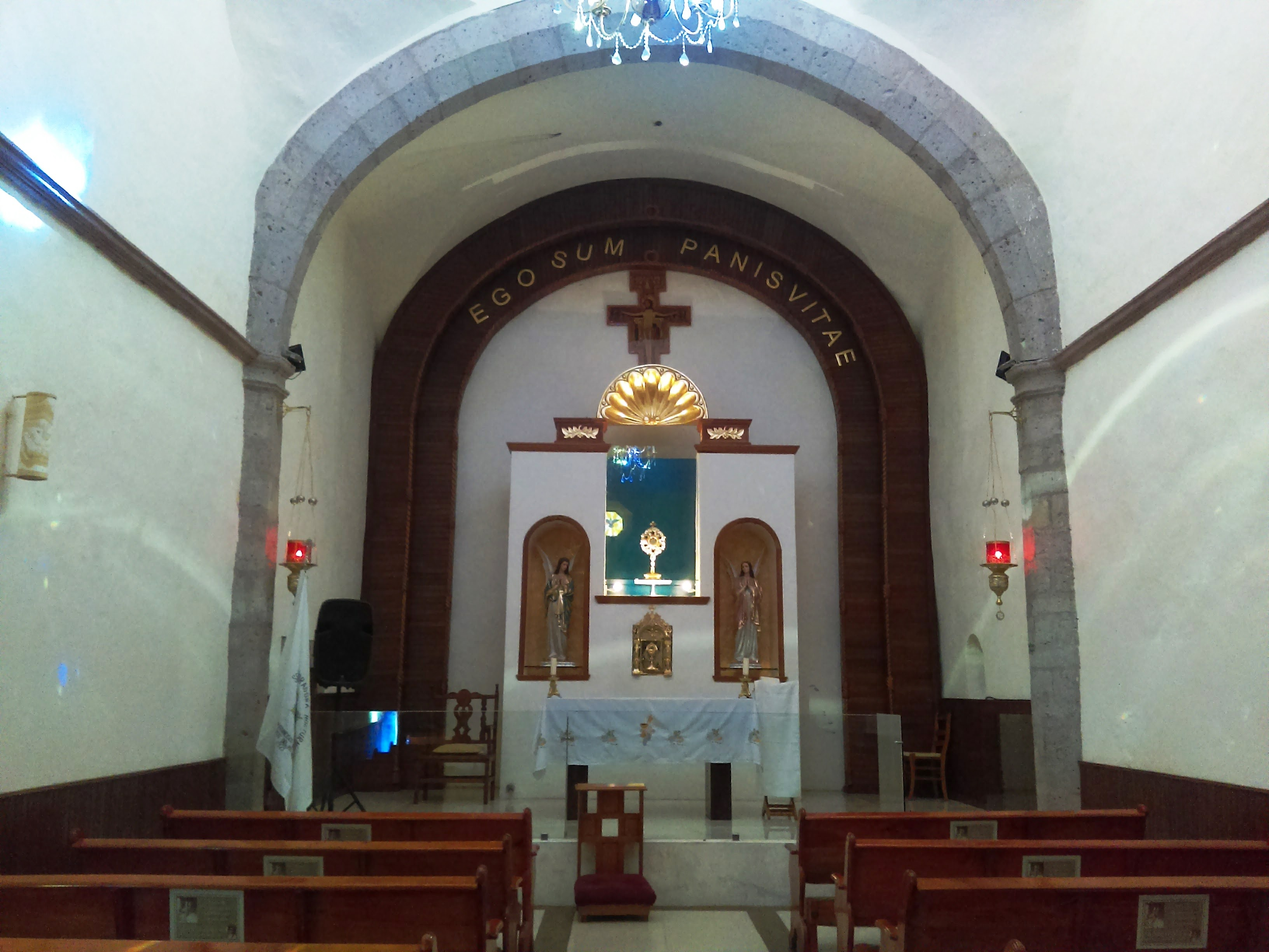 Templo y exconvento de San Francisco en Tepeji del Río, Hidalgo (México).